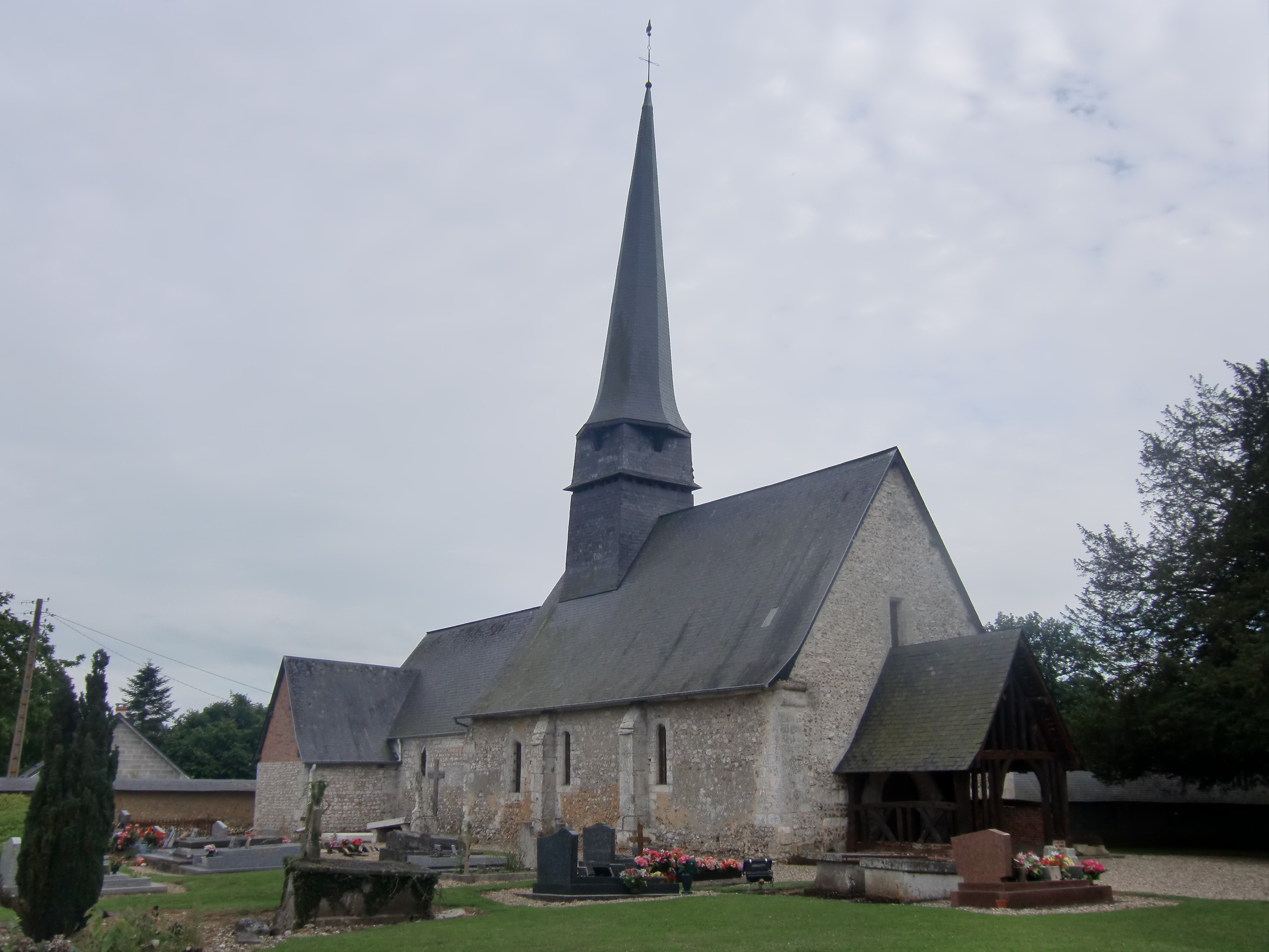 Église de Bosc-Renoult-en-Roumois (Eure, Normandie, France)